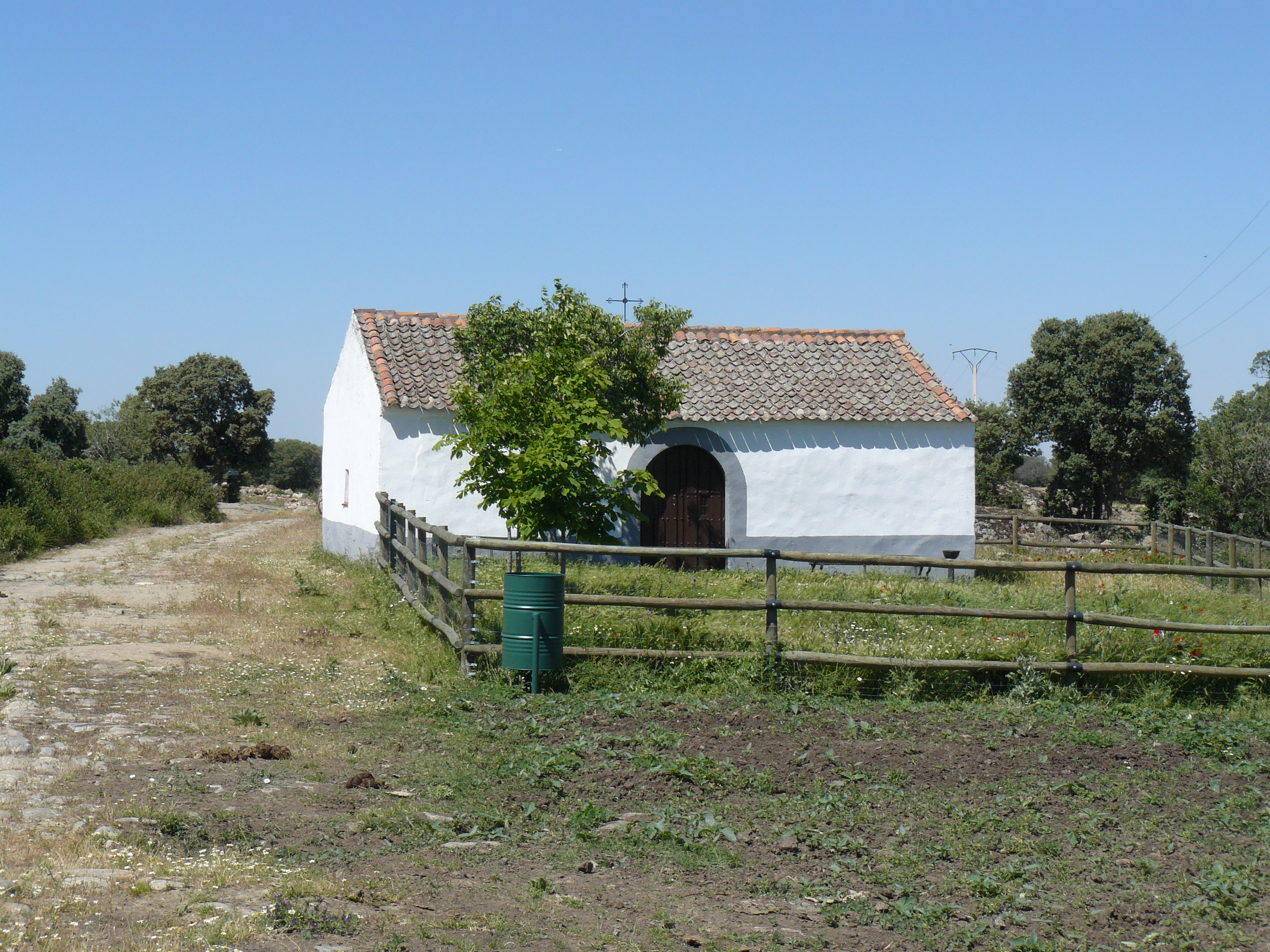 Revenga, Segovia.